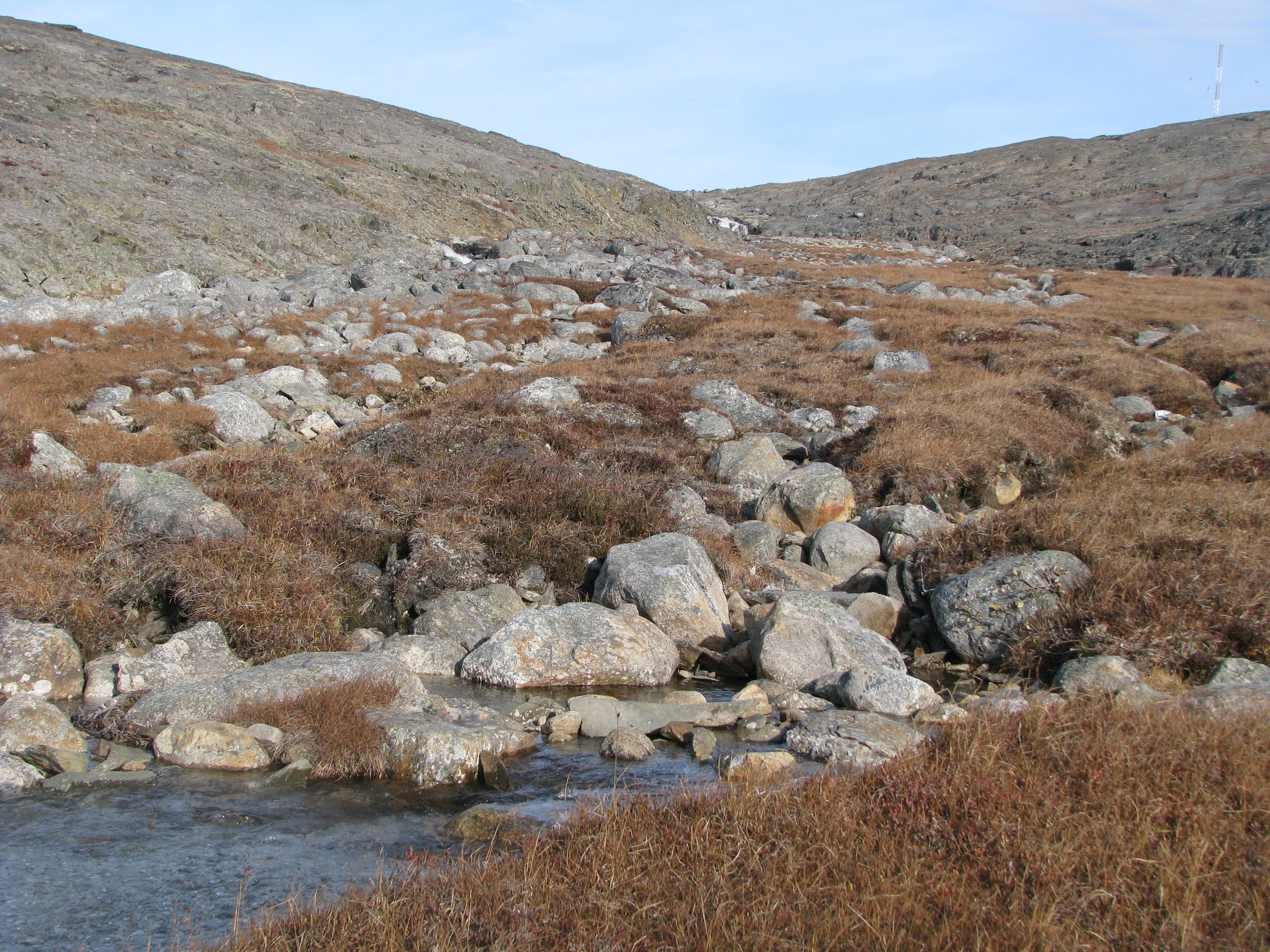 Rock Valley, Kangirsuk, Nunavik, Quebec.